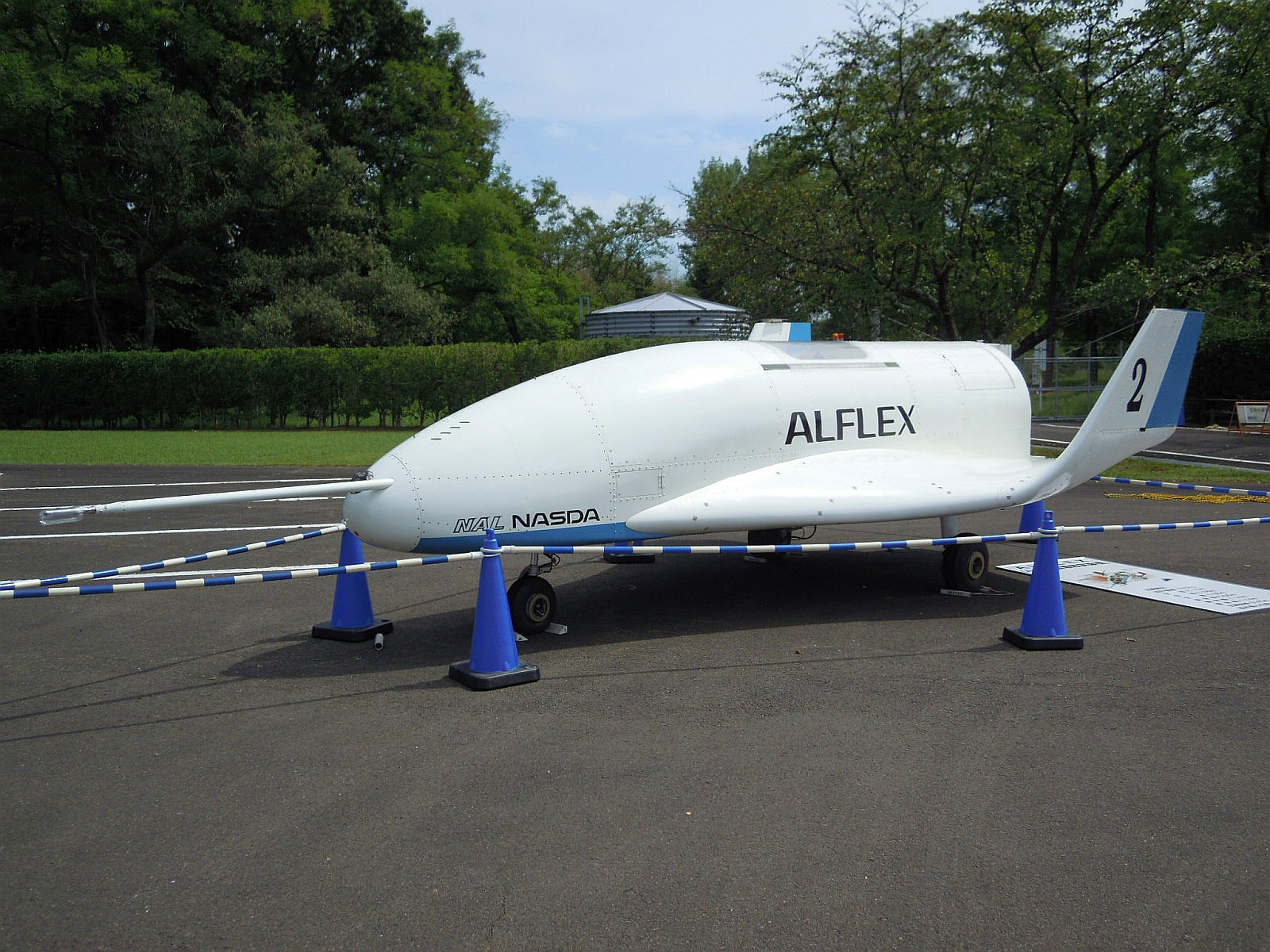 2012年9月9日、JAXA角田宇宙センター特別公開で特別展示されたALFLEX2号機